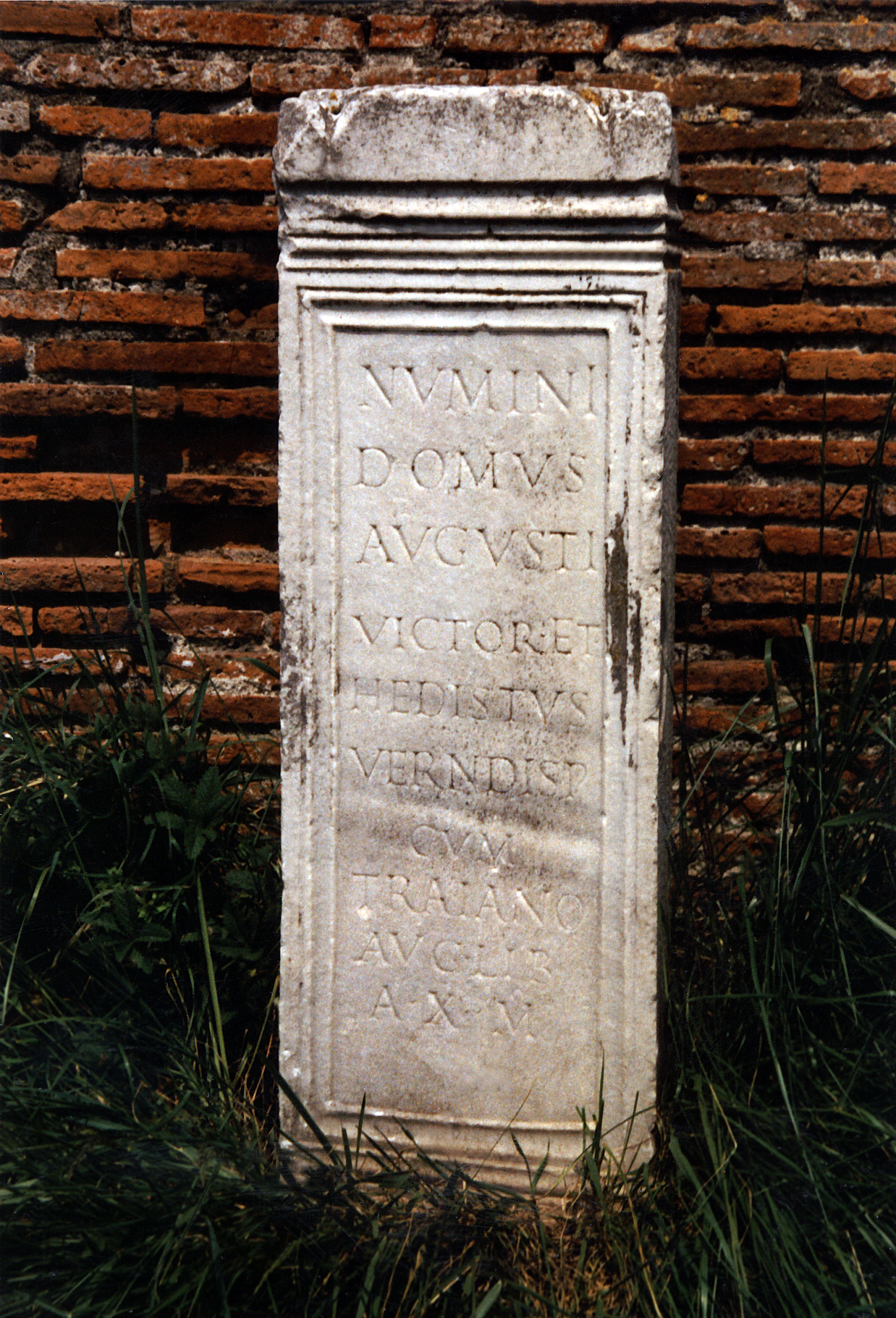 Bauinschrift am Forum der Korporationen in Ostia Antica, CIL XIV, 04319, Latium, Italien ( CIL 14, 04319 = AE 1908, 00117 = AE 1908, +00184). Numini domus Augusti Victor et Hedistus vern(ae) disp(ensatores) cum Traiano Aug(usti) lib(erto) a(nni) X m(agistr)o